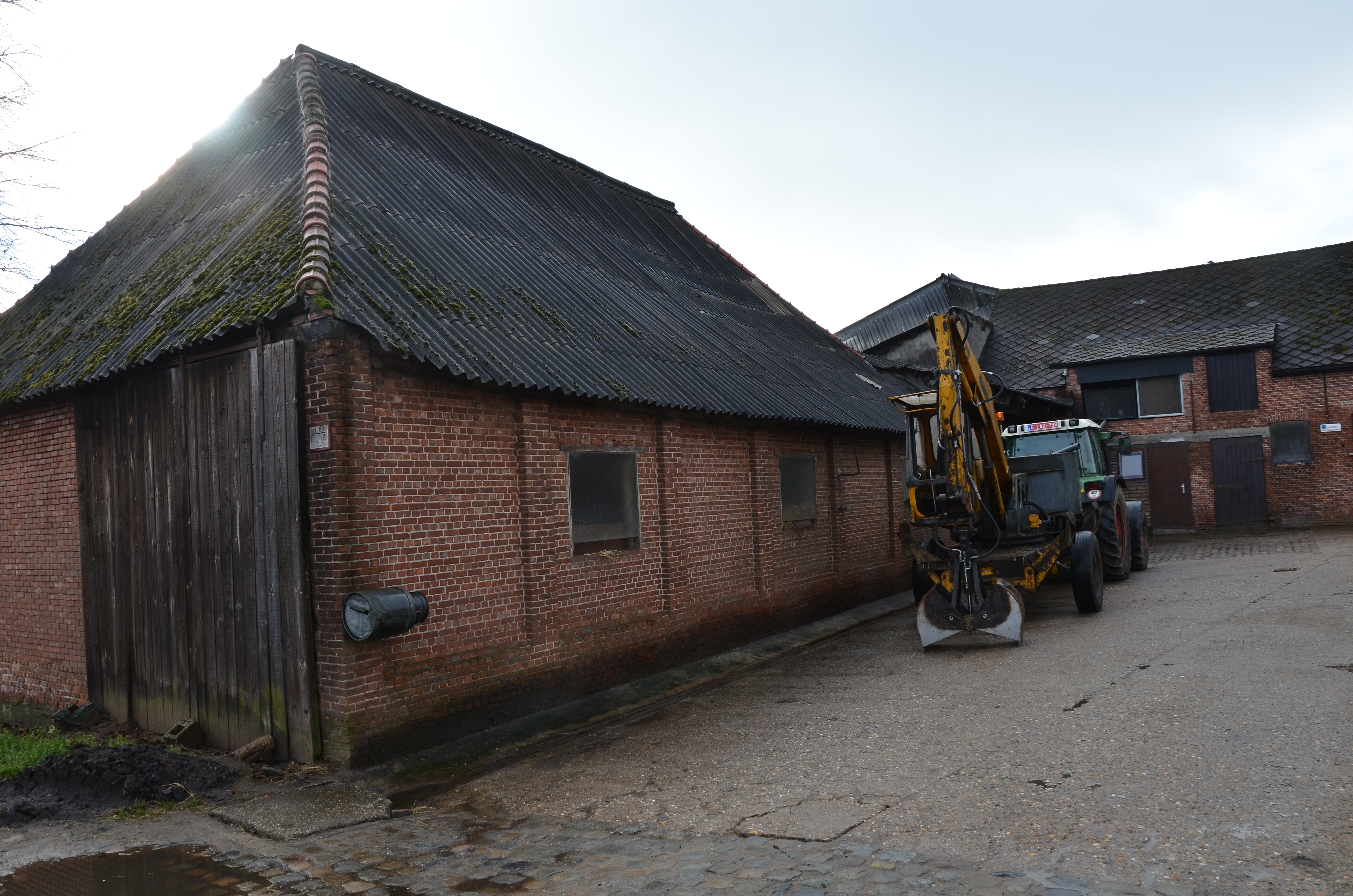 Kempische schuur